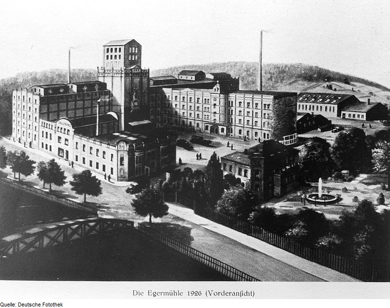 Original image description from the Deutsche FotothekFreital- Deuben. Egermühle 1926, Vorderansicht, aus: Die Egermühle 1876–1926